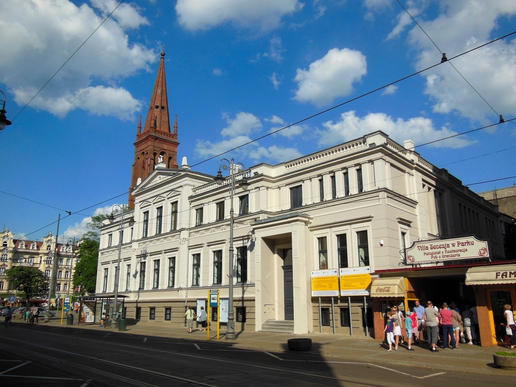 Dawne kasyno cywilne (1887), Pomorski Dom Sztuki, od 2006 r. w gestii Akademii Muzycznej w Bydgoszczy, ul. Gdańska 20